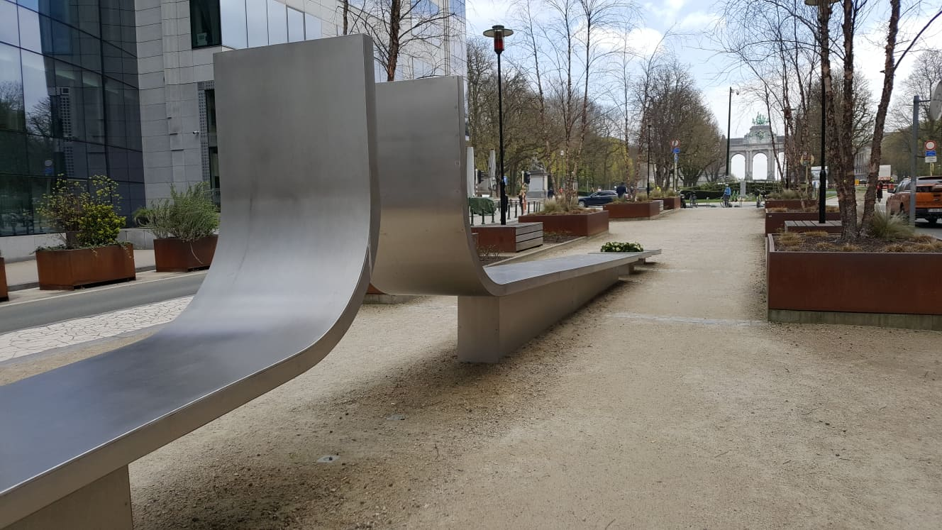 Gewond maar steeds overeind tegenover het onbegrijpelijke aan Schuman.